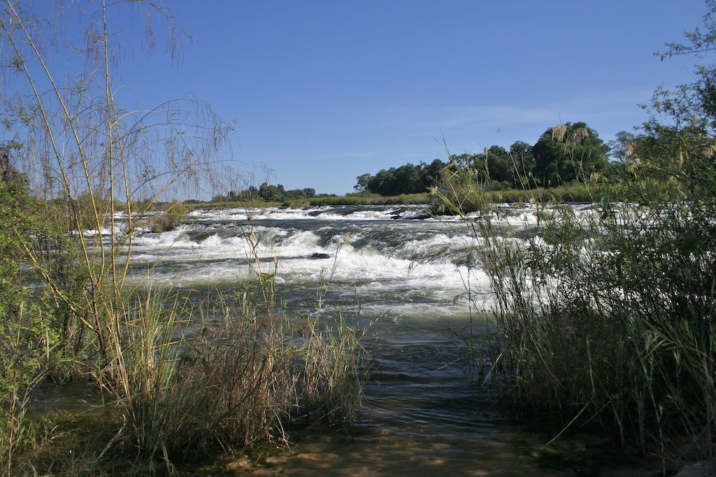 Popa Falls